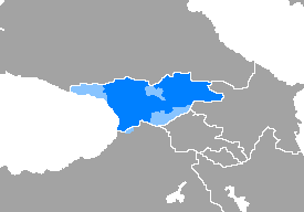 Idioma georgiano